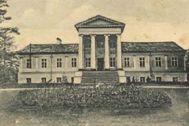 Onuškio dvaras (Rokiškio raj.) - Rokiškio krašto muziejaus archyvas